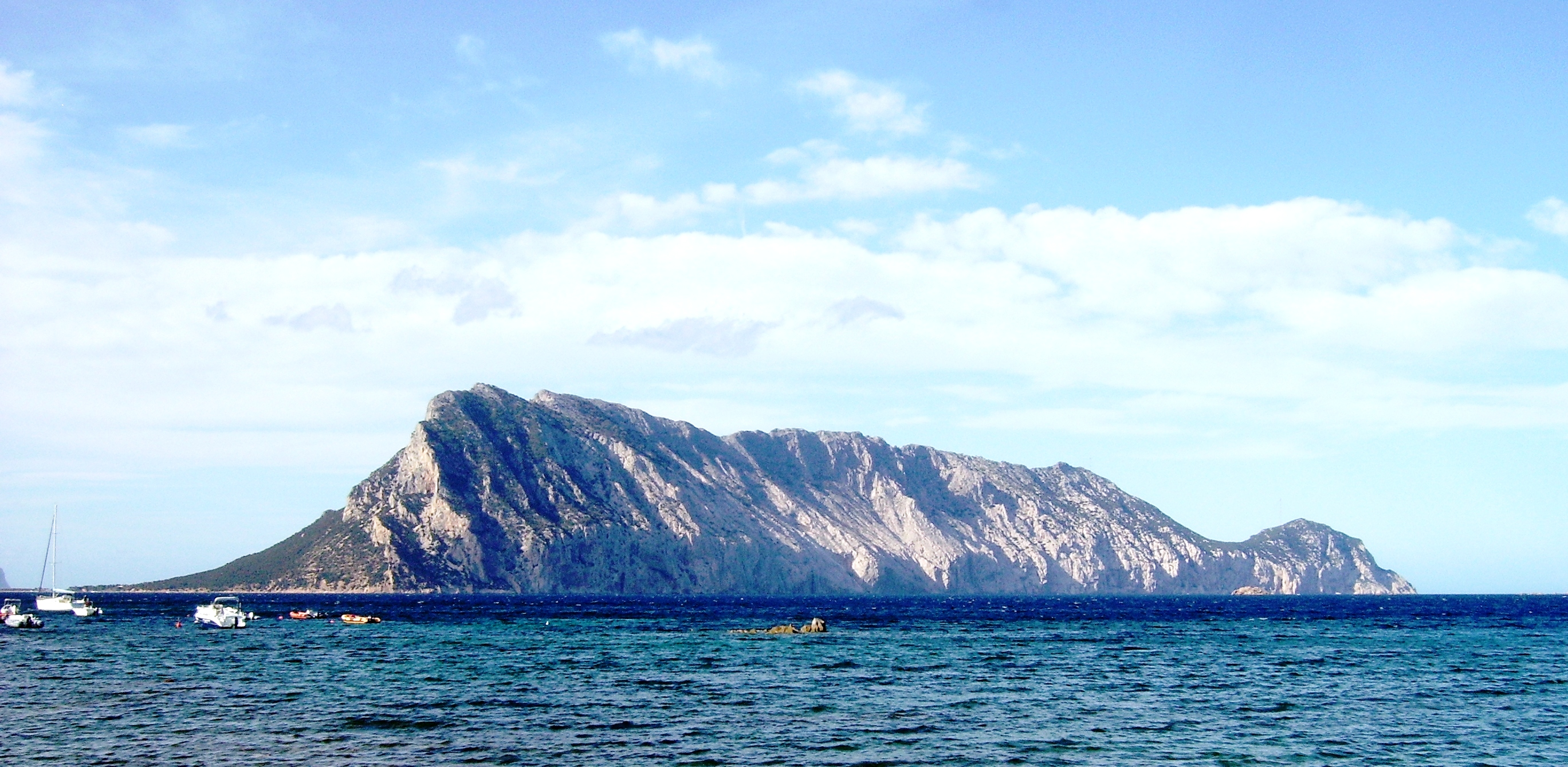 Sardegna - Gallura - Olbia - Isola di Tavolara - lato sud. Own work --Shardan 18:48, 8 November 2006 (UTC)--Shardan 02:23, 12 November 2006 (UTC)